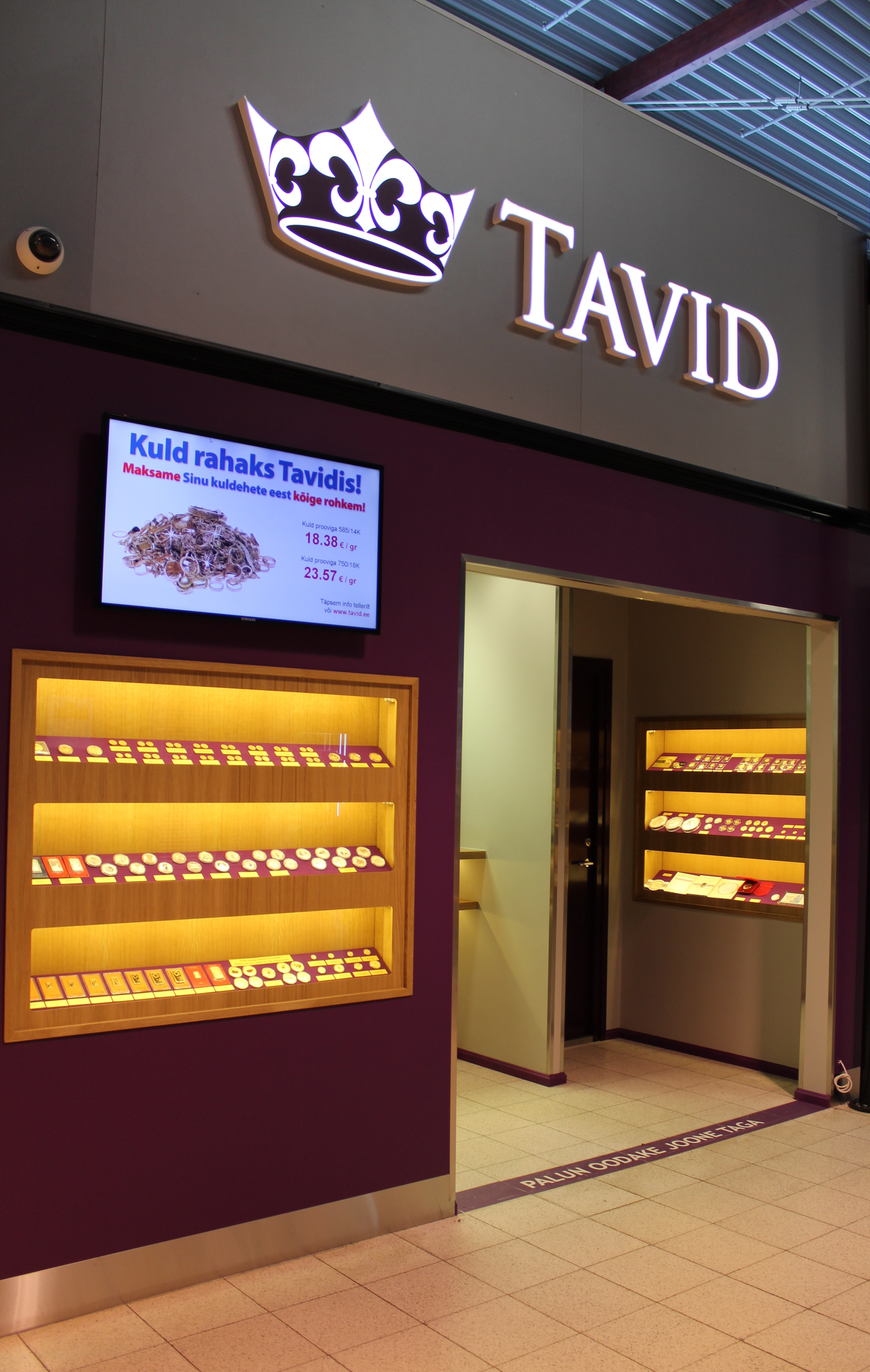 Tavid AS kontor Tartu Lõunakeskuses